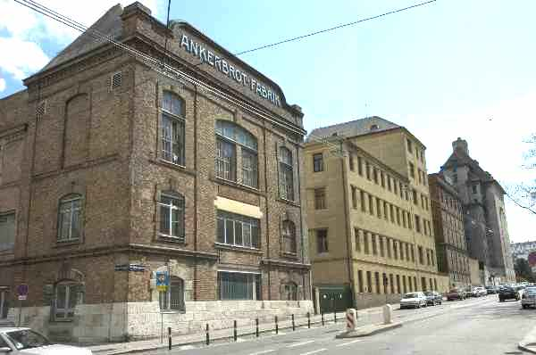 Ankerbrotfabrik in der Absberggasse in Favoriten